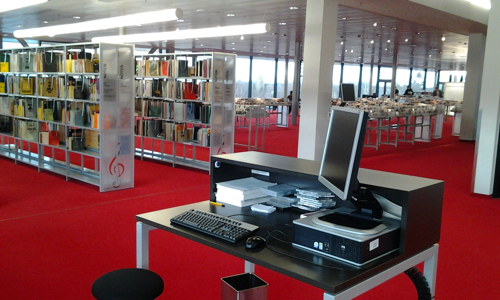 Innenansicht der Salzburger Stadtbücherei in der "Neuen Mitte Lehen"